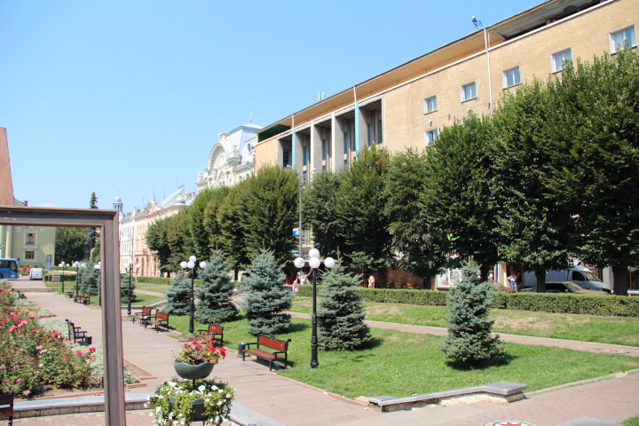 Театральна площа (Чернівці)